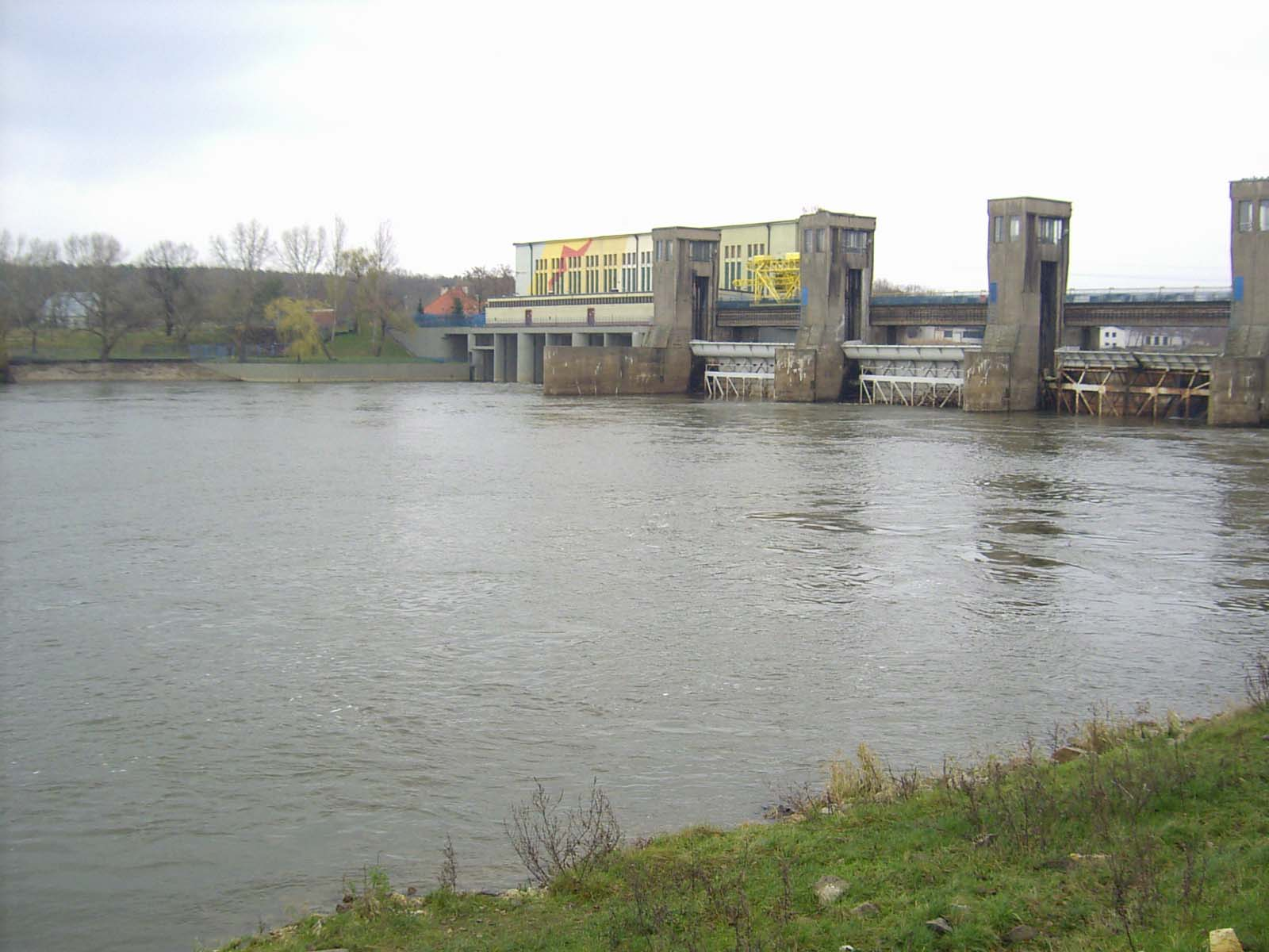 Stopień wodny Brzeg Dolny-Jaz wraz z elektrownią